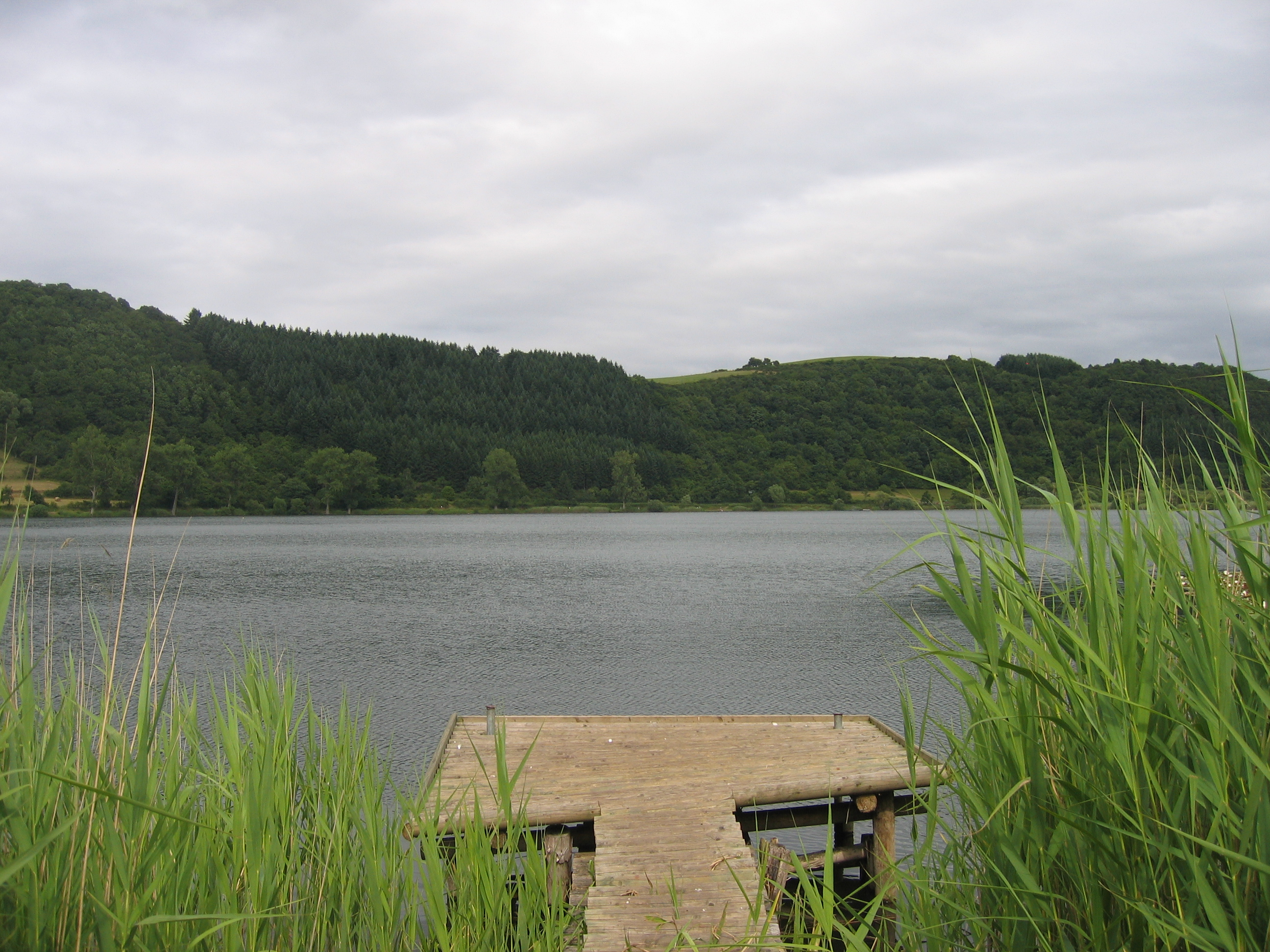 Das Meerfelder Maar in der Vulkaneifel